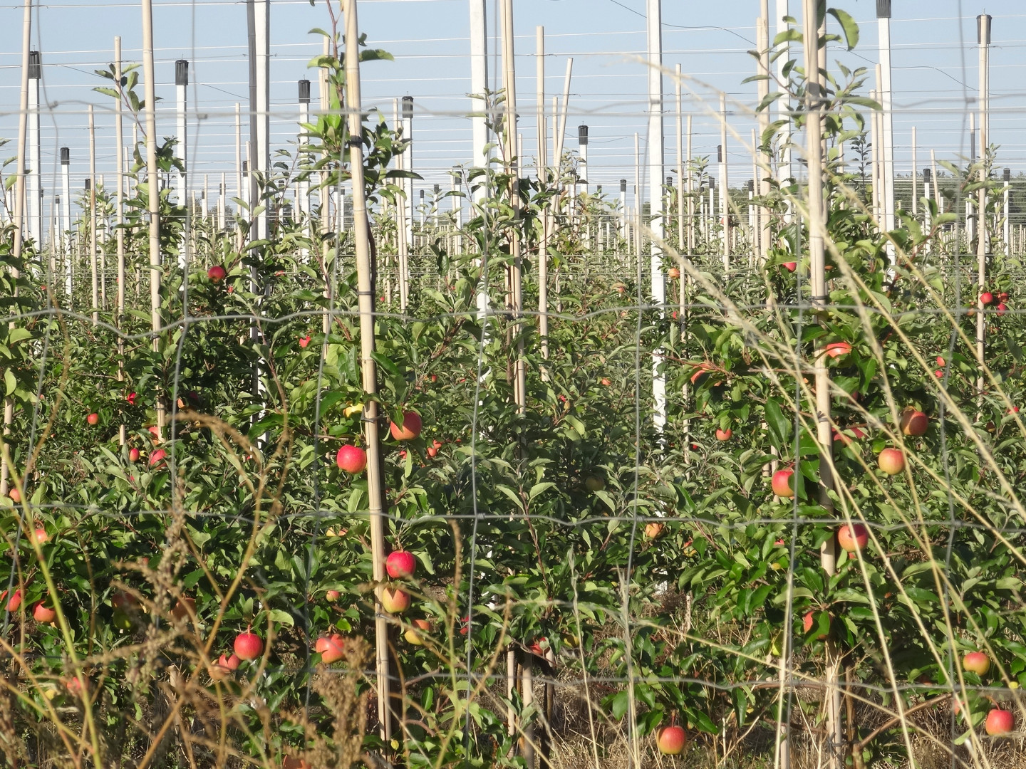 Sad jabłoniowy koło wsi Trzemiętowo w powiecie bydgoskim